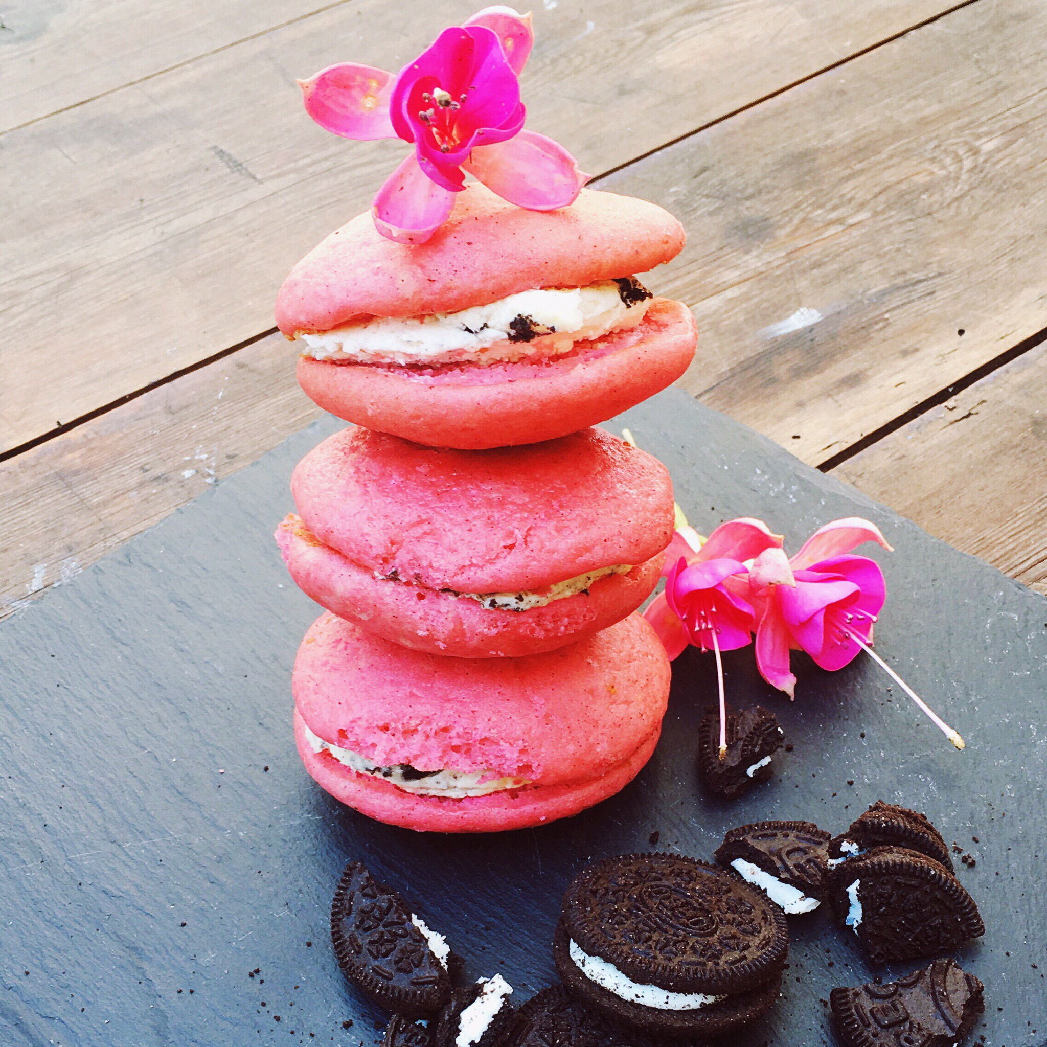 Pink Velvet Whoopie Pies med Oreo Cream Cheese fyld